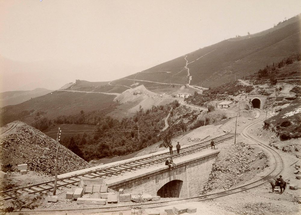 Fotografía incluida en el álbum Inauguración de la línea de Asturias, 15 de agosto de 1884: Ferro-carriles de Asturias, Galicia y León", de 24 fotografías. Esta muestra, en primer plano, el pontón de Entrambosríos